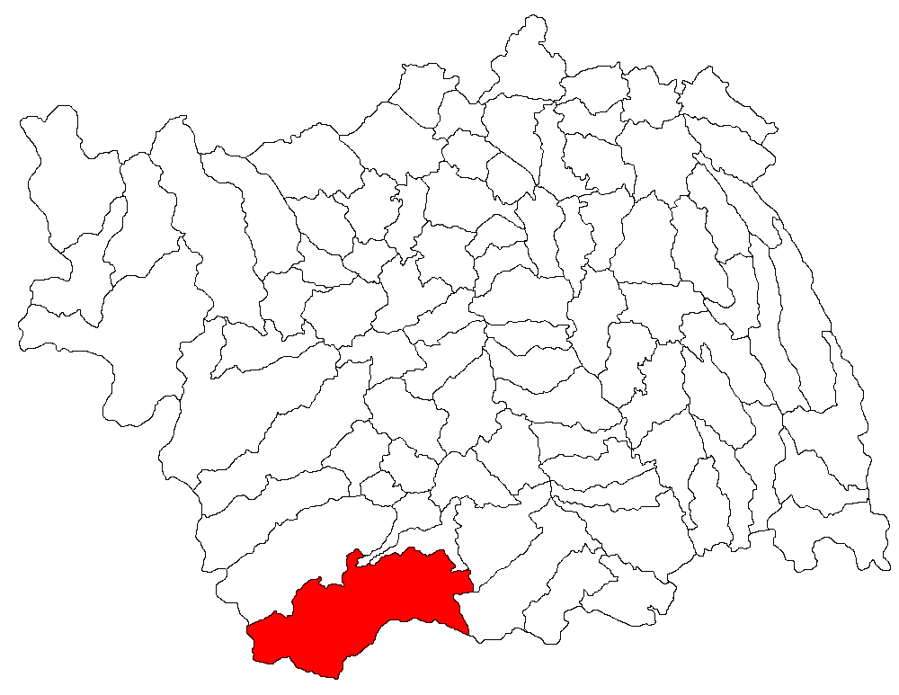 Categorie:Hărţi ale judeţului Bacău